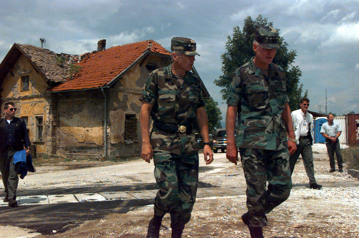 GEN Wesley E. Clark, Supreme Allied Commander Europe (SACEUR), (left) walks with GEN William Crouch, Stabilization Force (SFOR) commander, against a backdrop of a war damaged house, to the Ilidza Compound helicopter pad after a day visit to the SFOR troops. This was GEN Clark's first visit to Bosnia-Herzegovina since becoming (SACEUR).